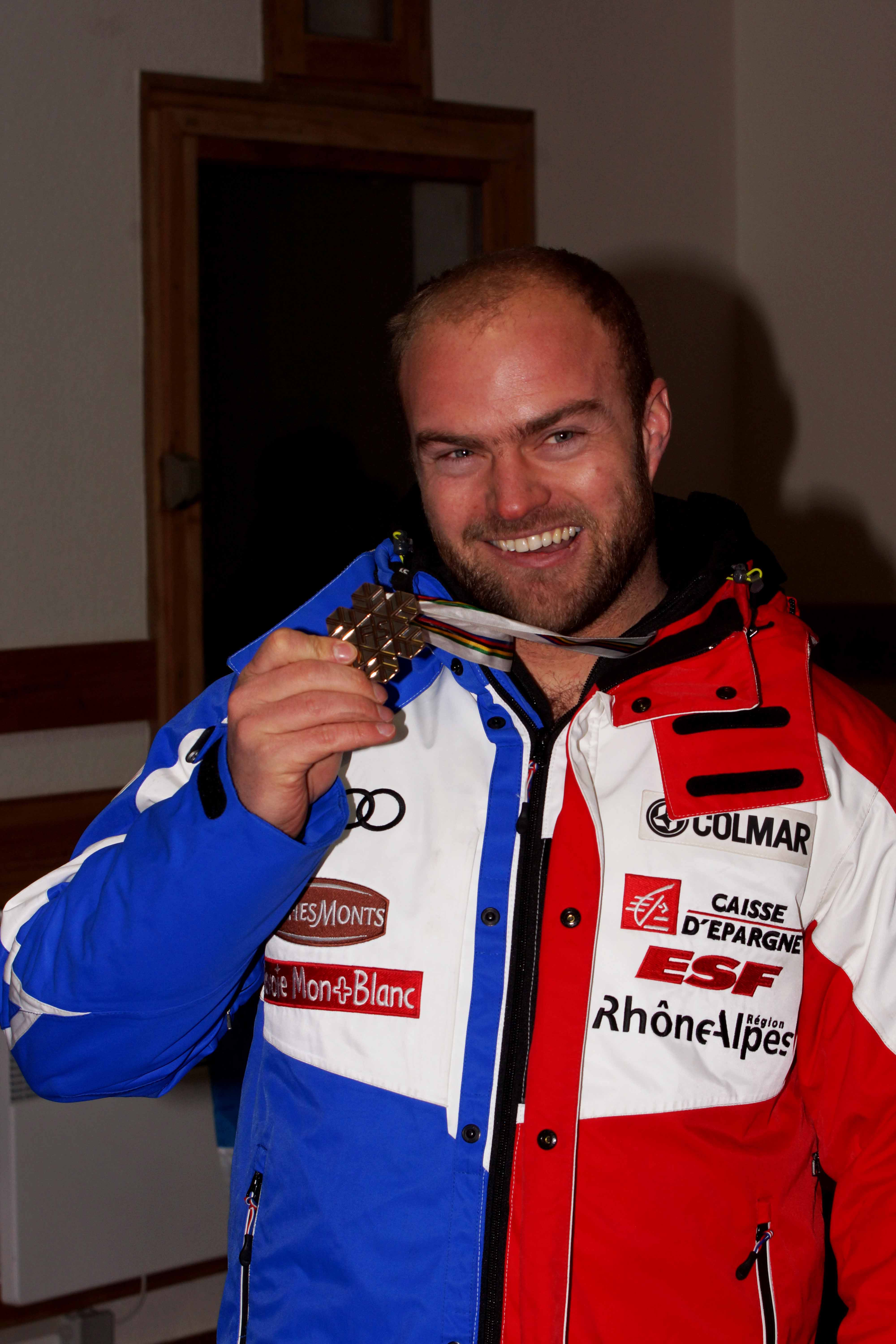 David Poisson arborant sa médaille de bronze des championnats du Monde de Descente en 2013, lors de son retour à Peisey Vallandry le 13 Février 2013